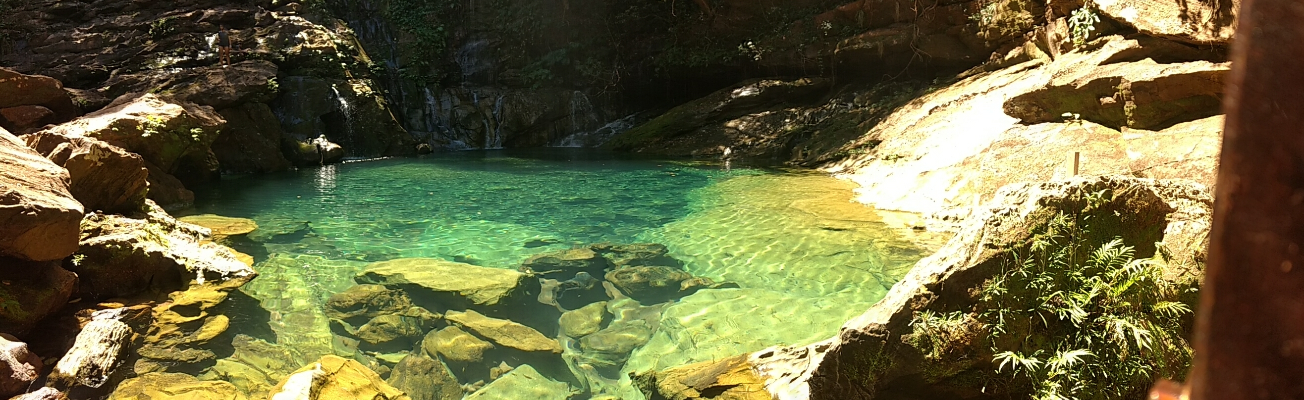 Poço Azul, Riachão - Maranhão